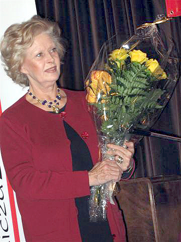 Beata Tyszkiewicz (b. 1937), Polish actor